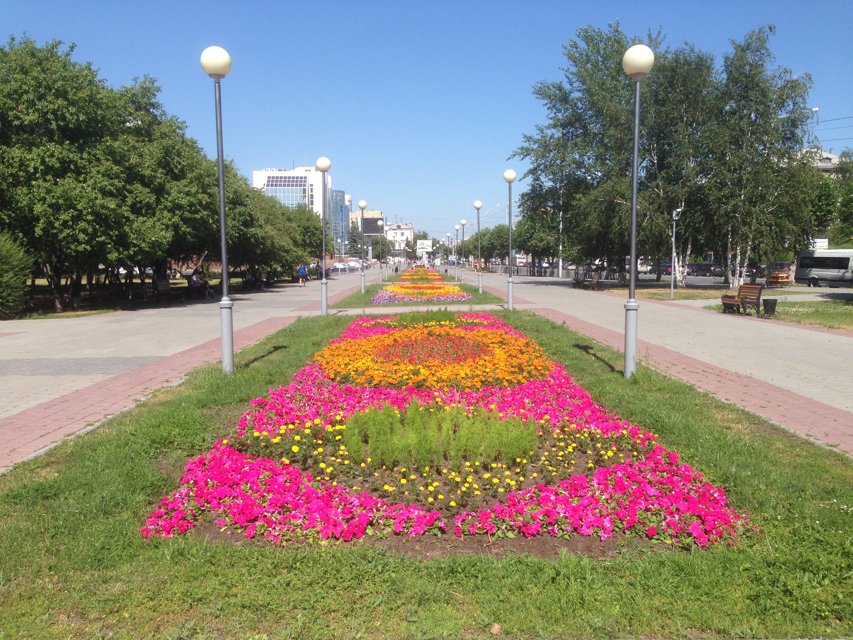 Floroj en Memorplaco. Tjumeno, Rusio.